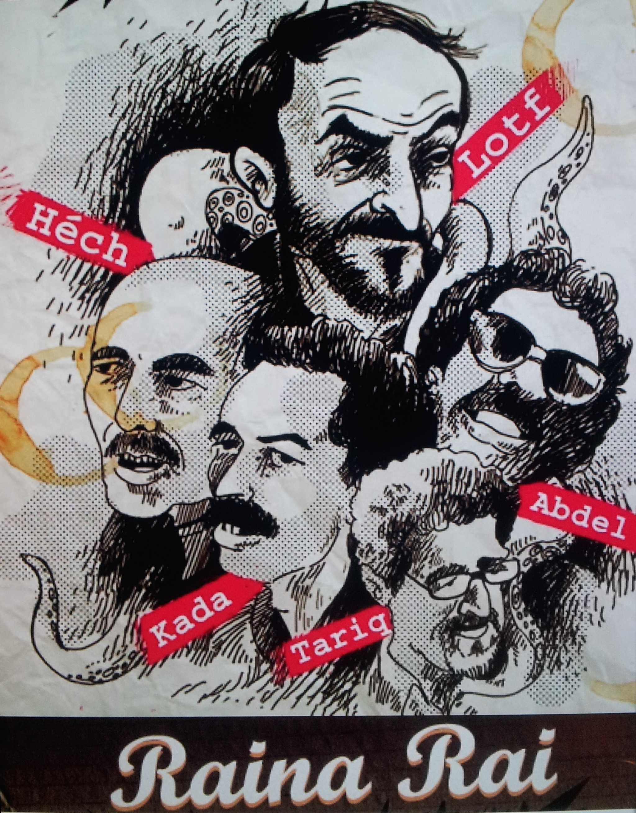 Raïna Raï (1980-1985), groupe musicale algérien, composé de Hachemi Djellouli, Kada Guebbache , Tarik Naïm, Kaddour Bouchentouf, Lotfi Attar et Djilali Razkallah